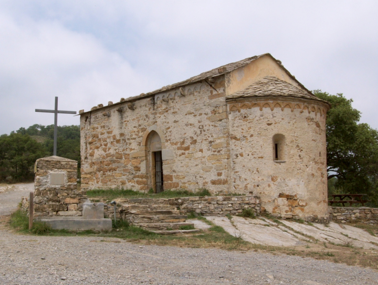 Passkirche (457 m ü NN.) Santa Brigida (erbaut 1425) auf der Straße von Civezza nach Dolcedo, Von hier startet auch der "Brückenweg" Richtung Rio Merea und Pietrabruna